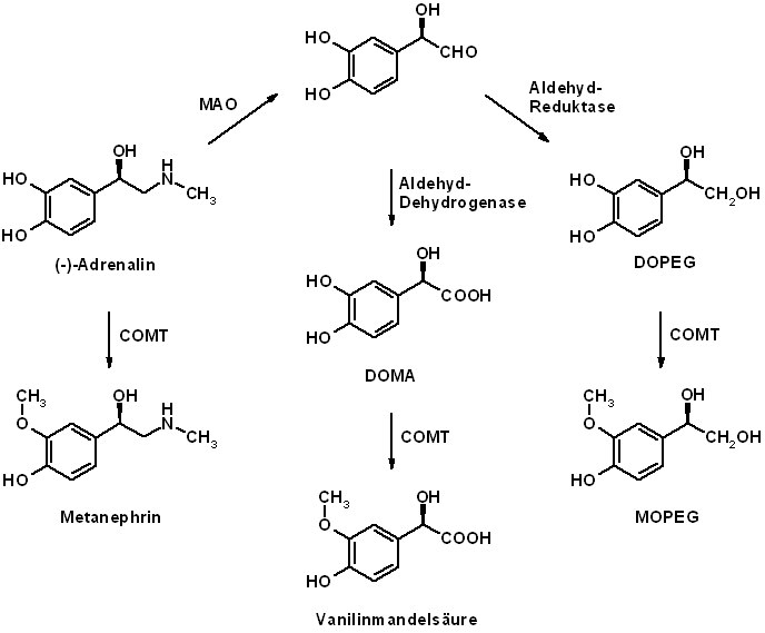 Metabolisierung von Adrenalin Sonstiges: Die Nutzung dieser Abbildung unterliegt keinen urheberrechtlichen Beschränkungen.